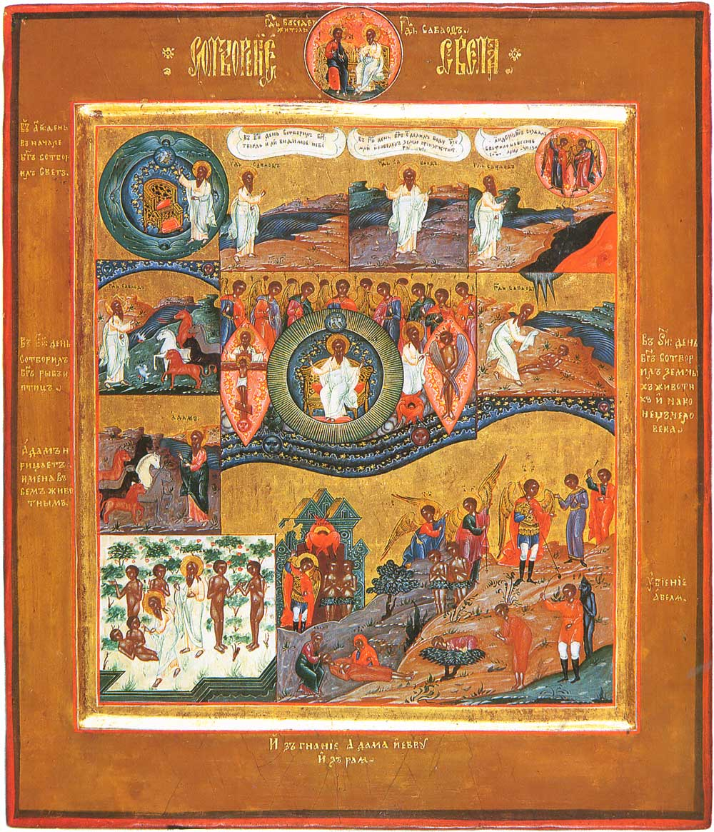 Сотворение мира ХIХ Государственный музей истории религии, Санкт-Петербург